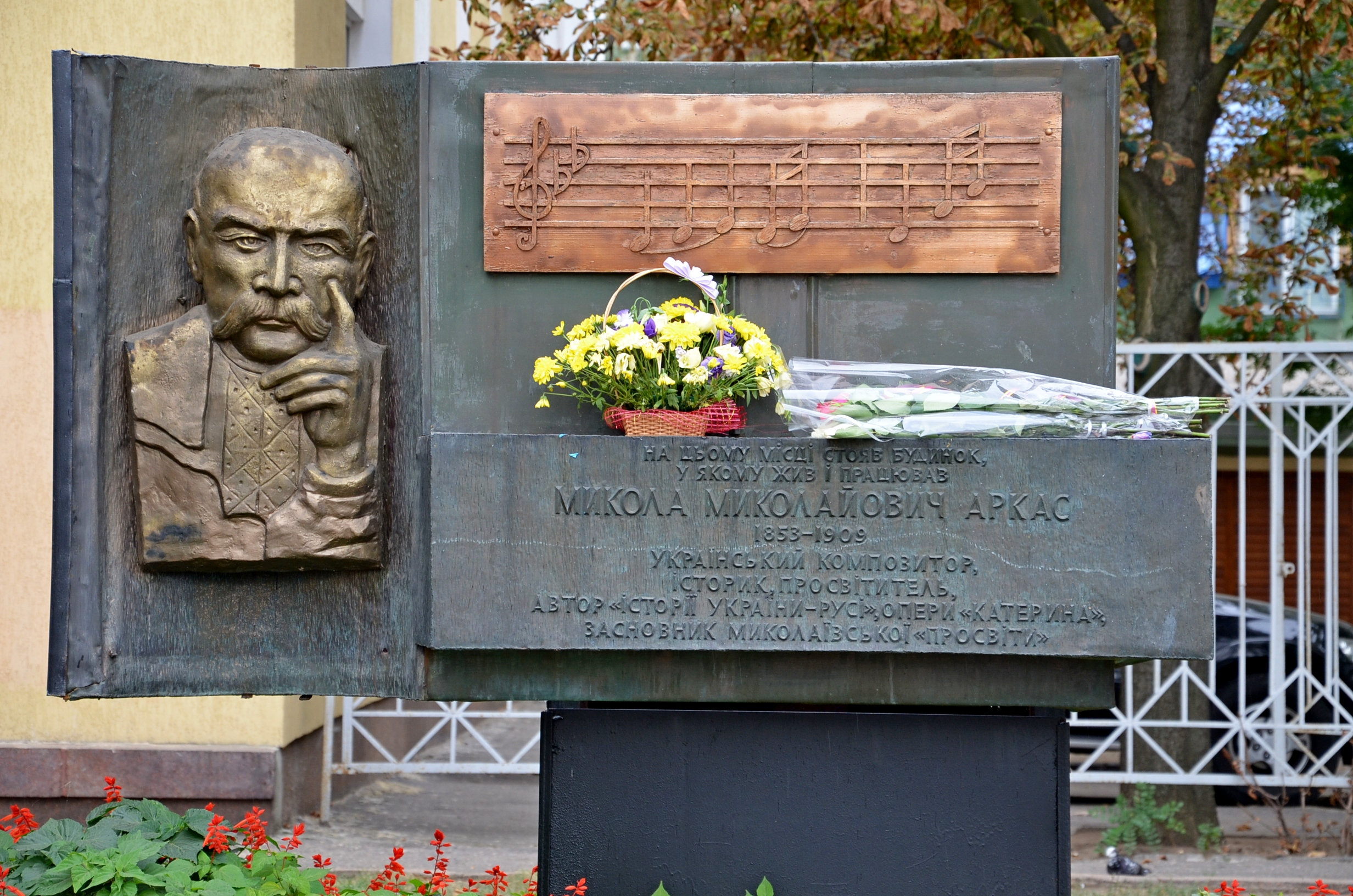 Місце, де упродовж сер. XIX - початок XX ст. знаходився будинок сім’ї Аркасів (пам’ятний знак), Миколаїв, вул. Радянська, 2 – ріг вул. Адміральської